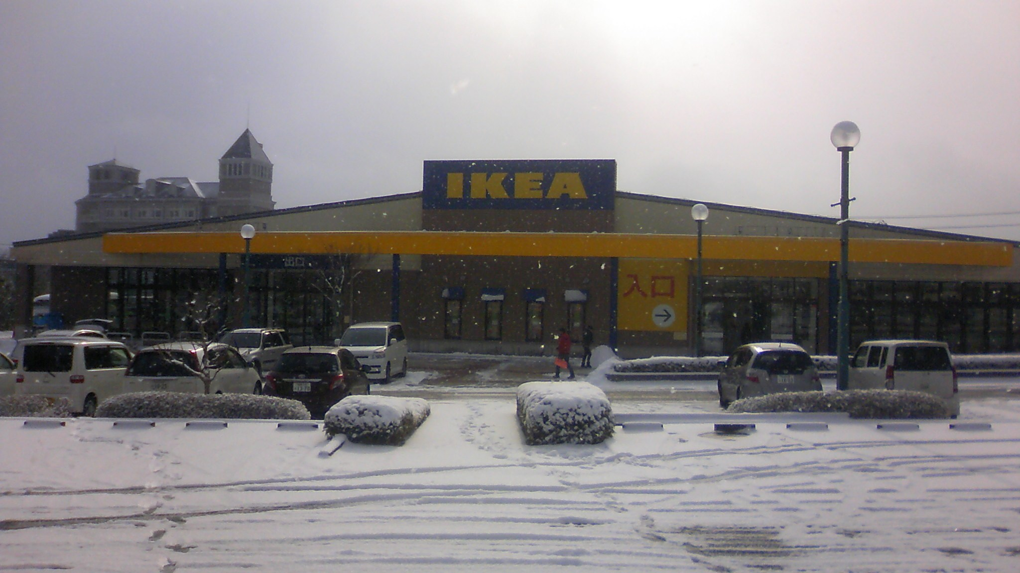 イケア仙台ミニショップ